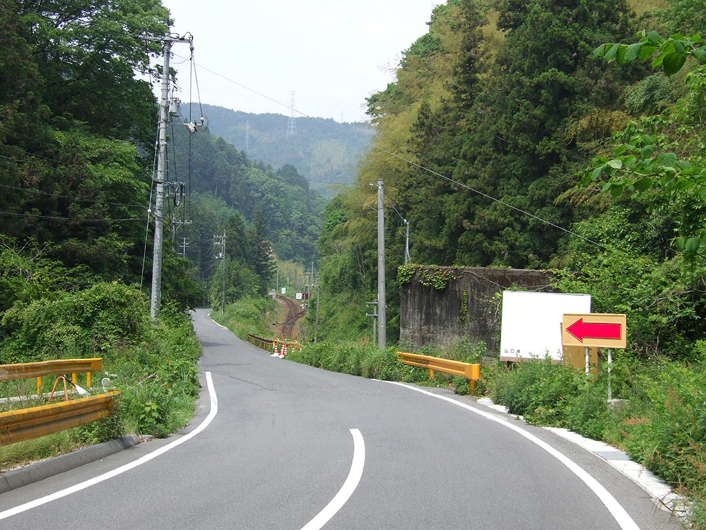 森ヶ原信号場周辺